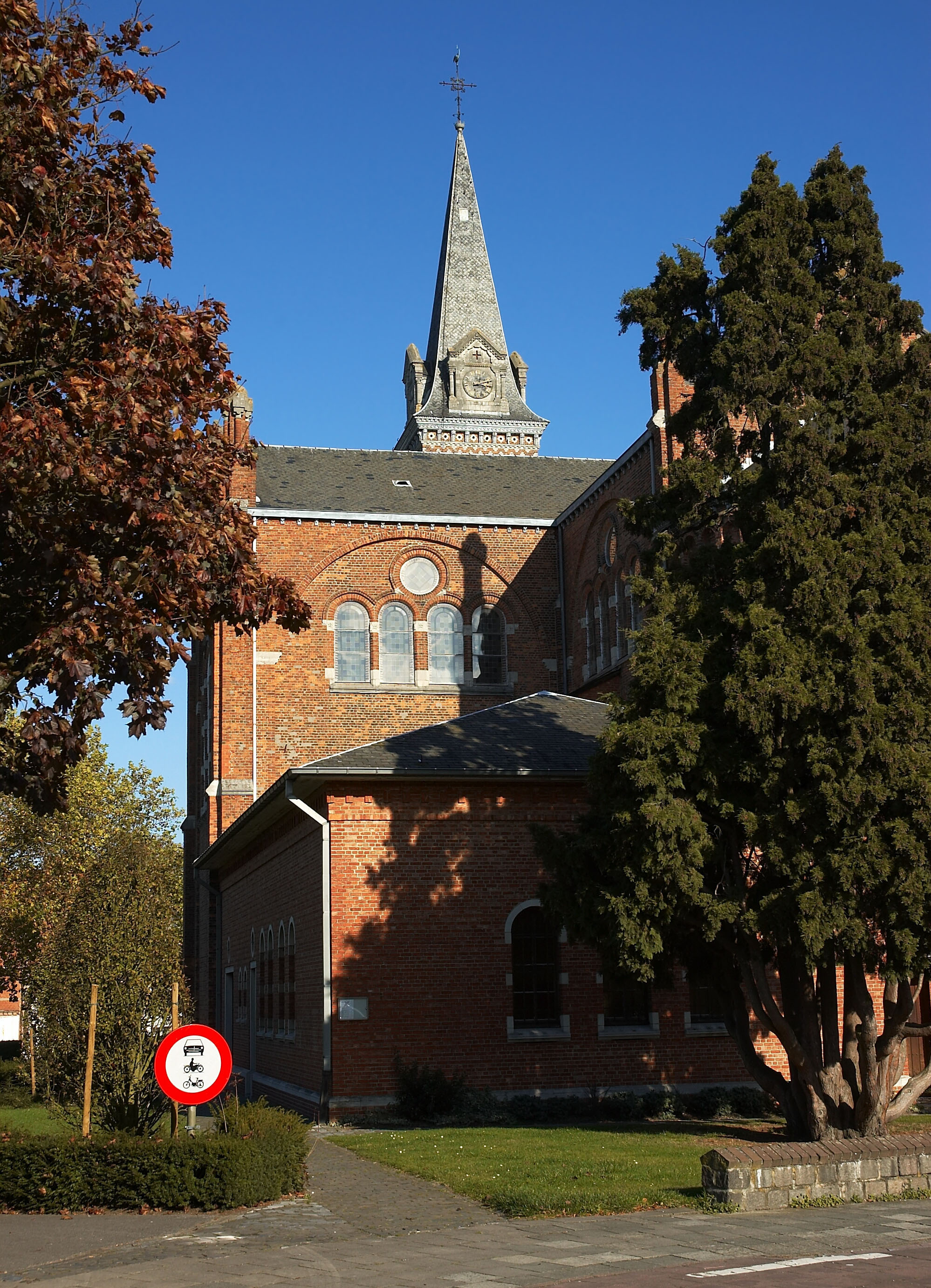 Sint-Lambertuskerk in Heverlee